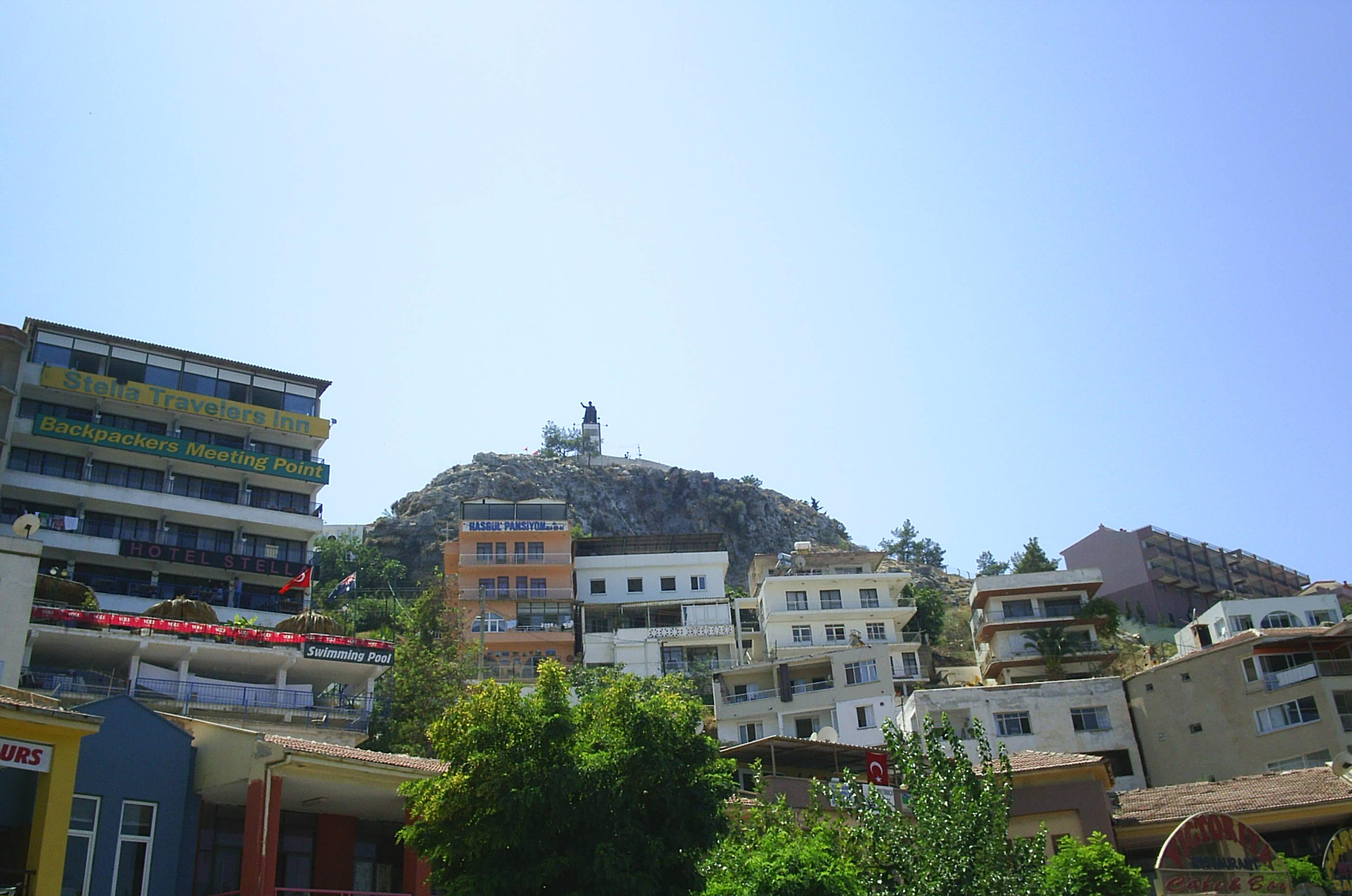 Kuşadası'nda Atatürk heykelinin aşağıdan görünümü